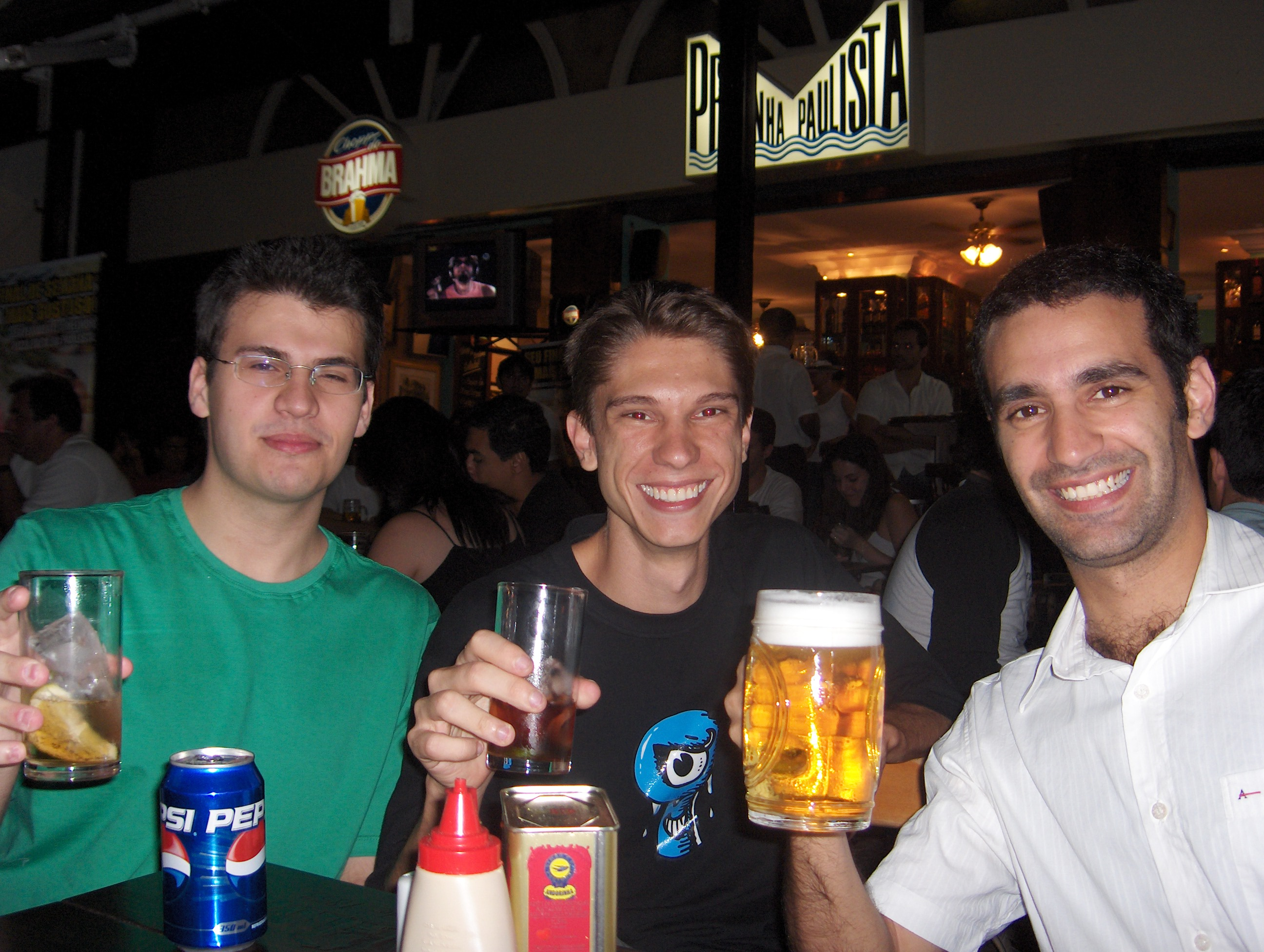 Da esquerda para direita: [1][2][3]. Foto tirada por Indech